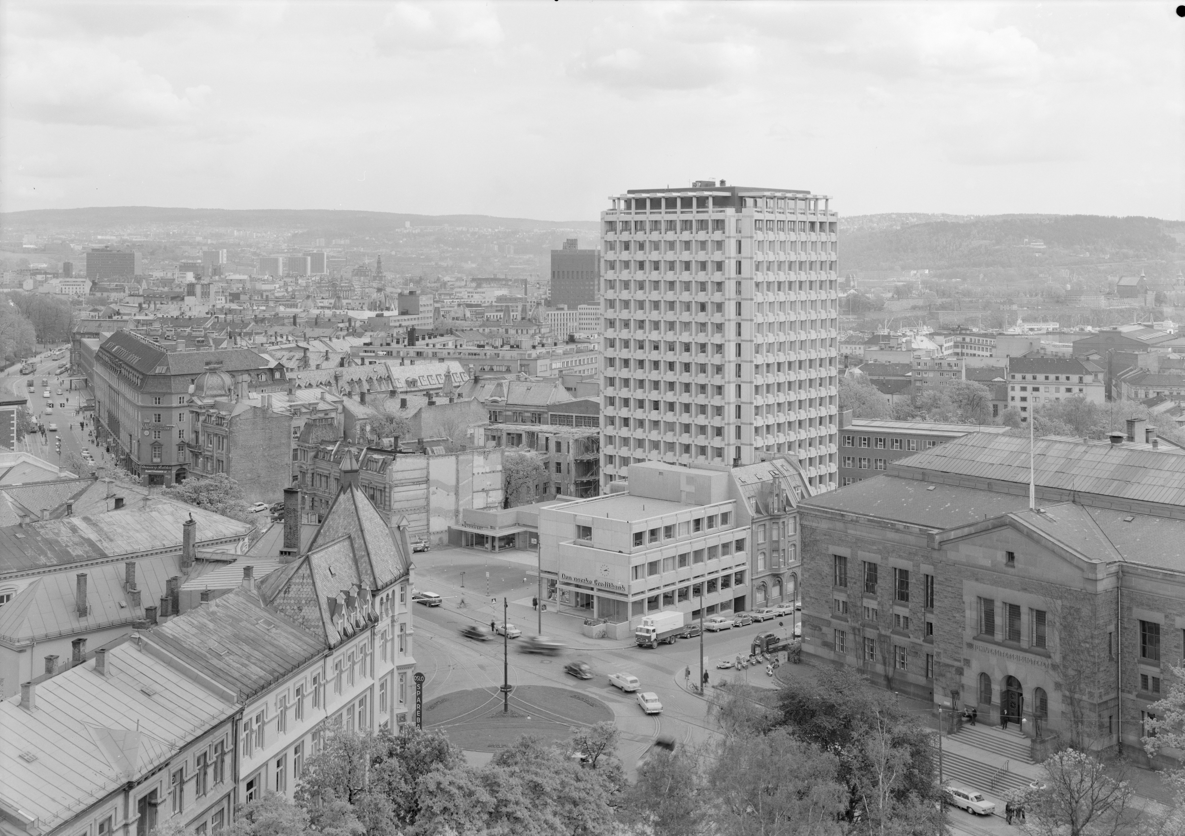 Oversiktsfoto over Indeks-bygget på Solli plass (Lapsetovet). *** Local Caption *** Engh, John, arkitekt (1915-1996)